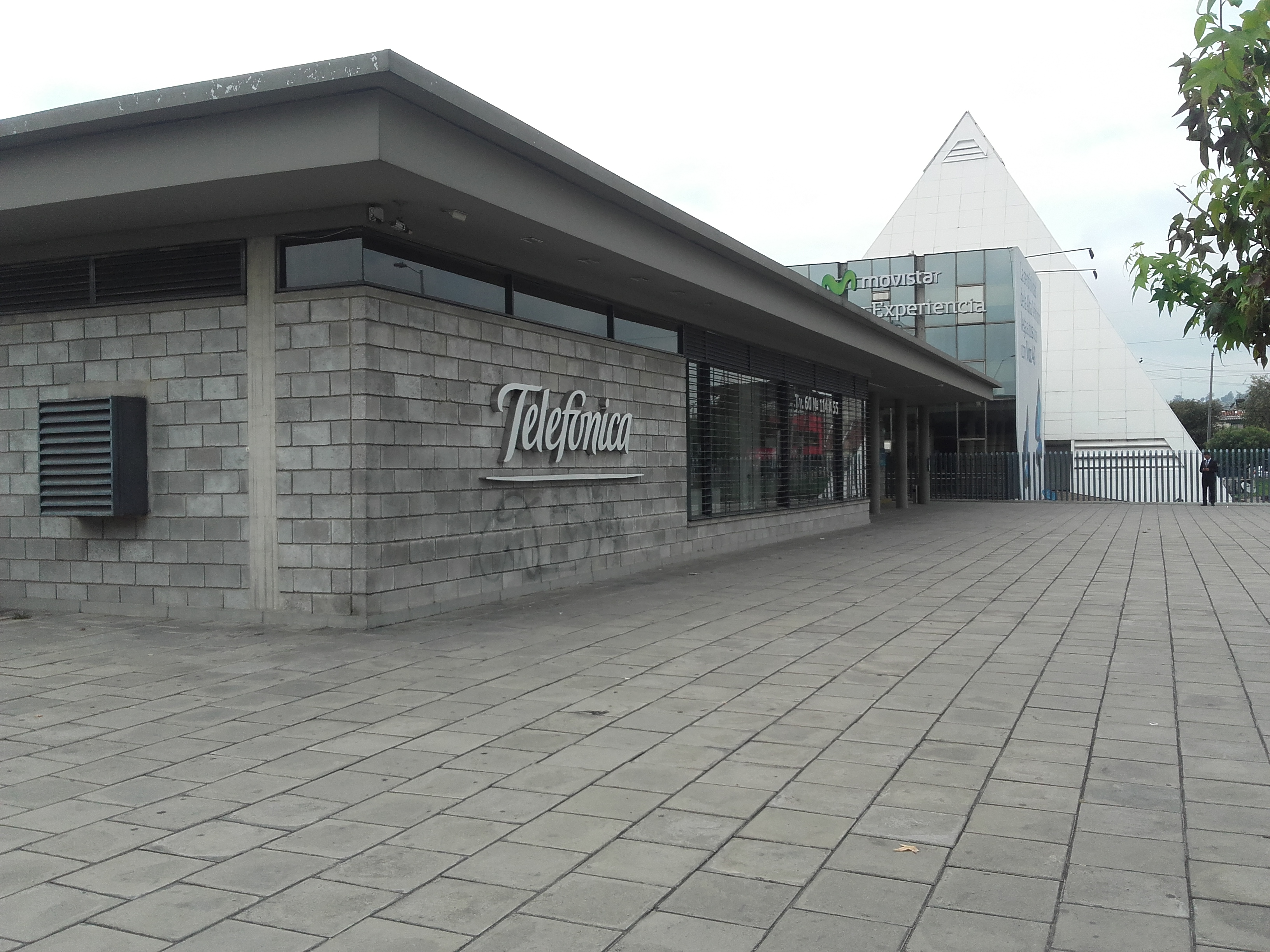 fcncncncnnmcmcmcmcgkgkgk